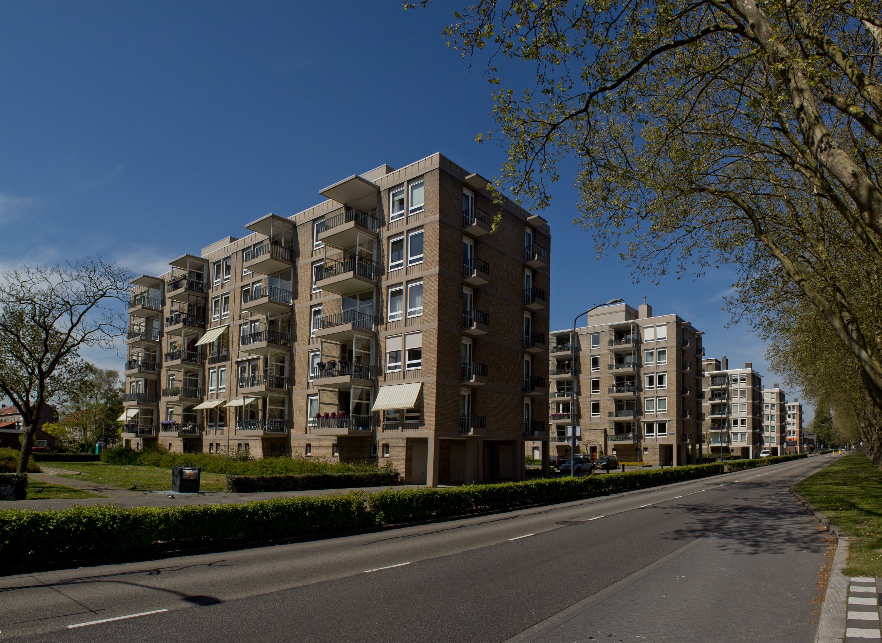 Hoogbouw langs de Pettelaarseweg te Den Bosch